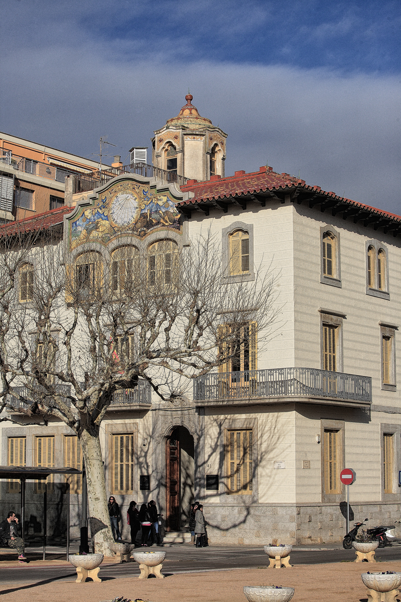 Situada al passeig del Mar Sant Feliu de Guíxols Baix Empordà Girona